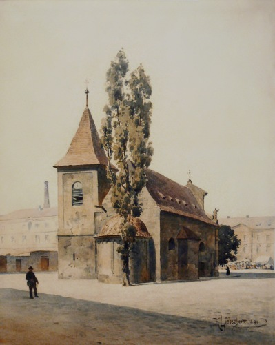 Smíchov, dnešní Arbesovo náměstí, kostel sv. Filipa a Jakuba (akvarel 1891). Netradiční pohled zezadu na románskou apsidu.